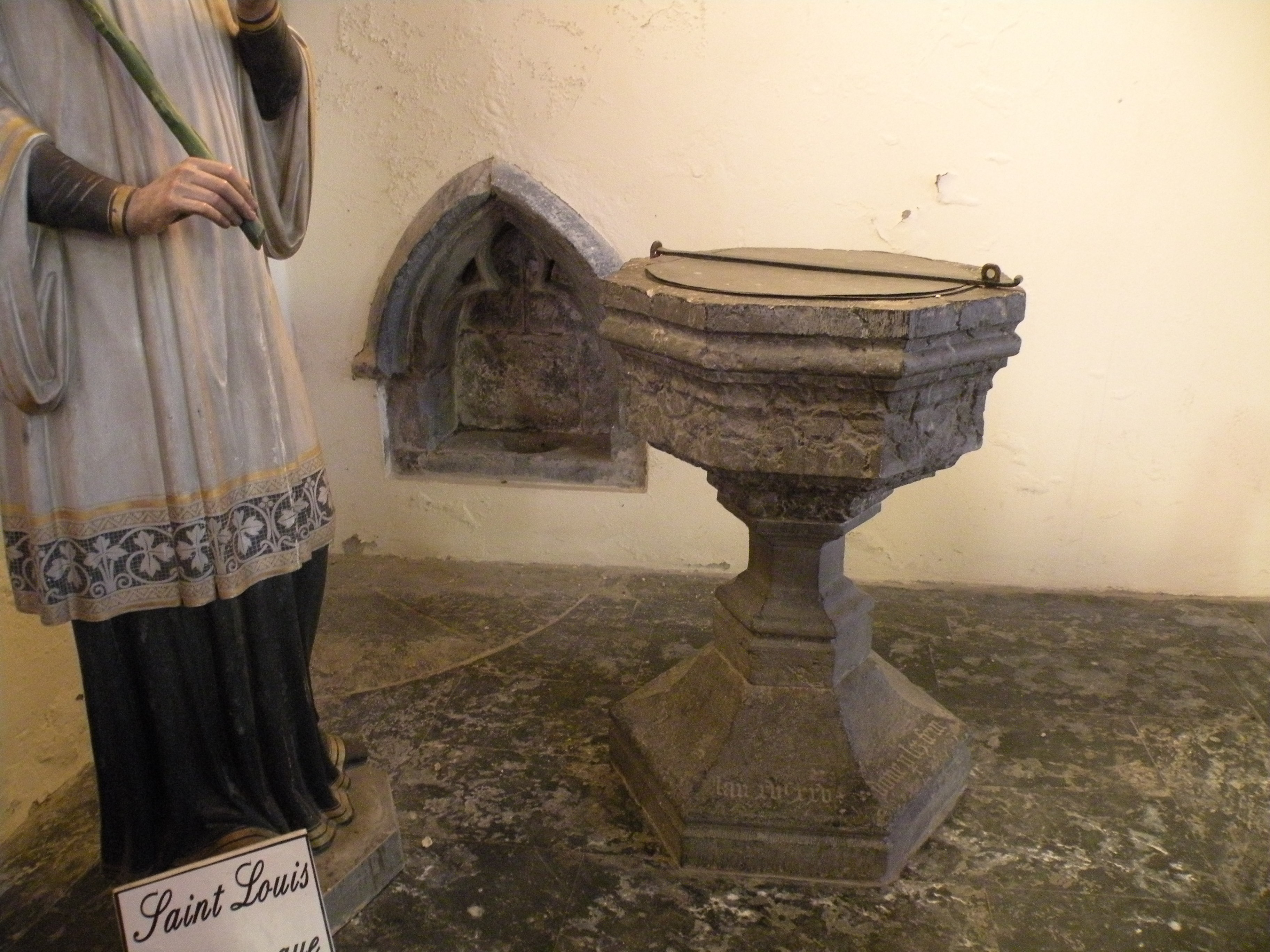 Église Saint-Martin de Cousolre